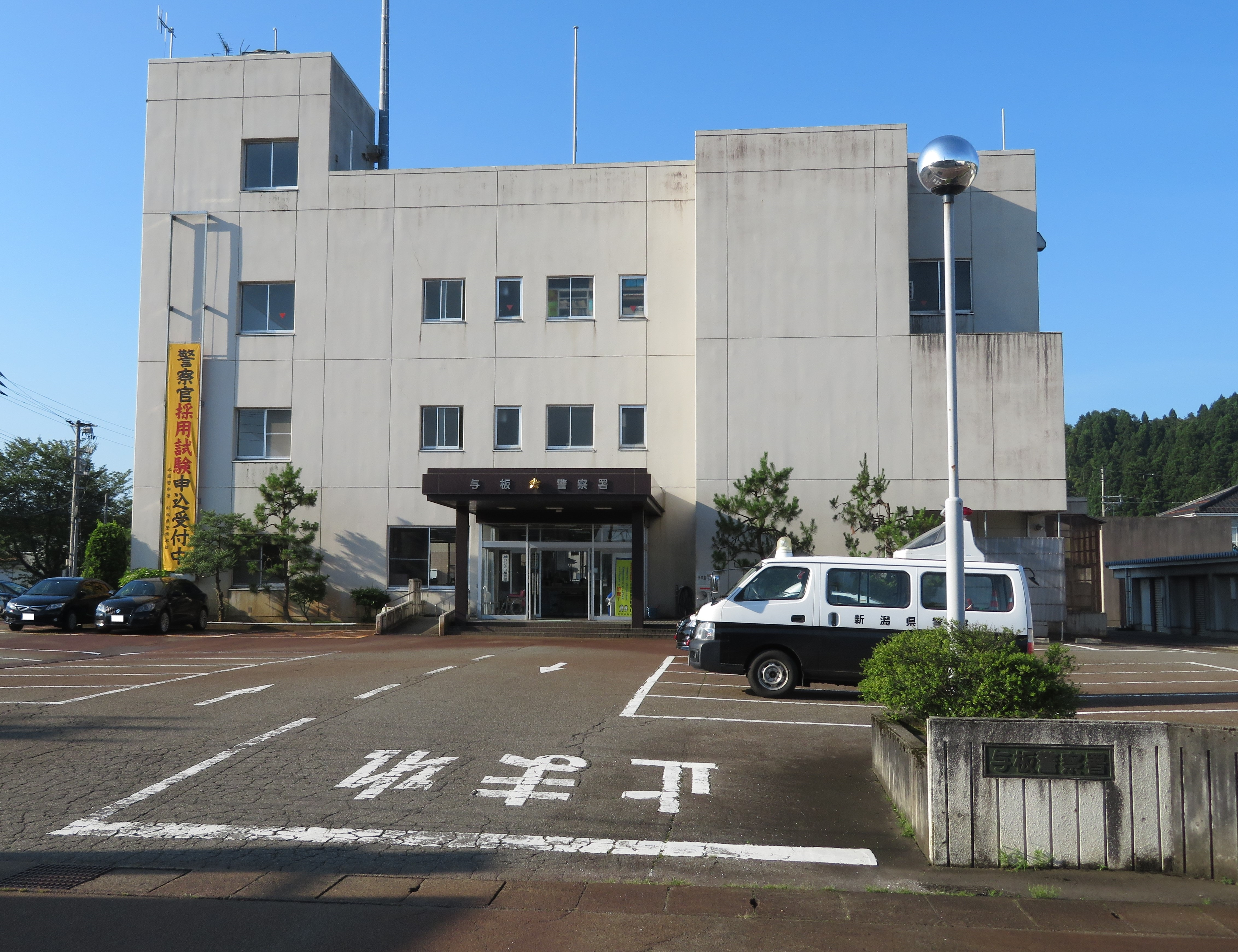 新潟県長岡市に所在する与板警察署庁舎